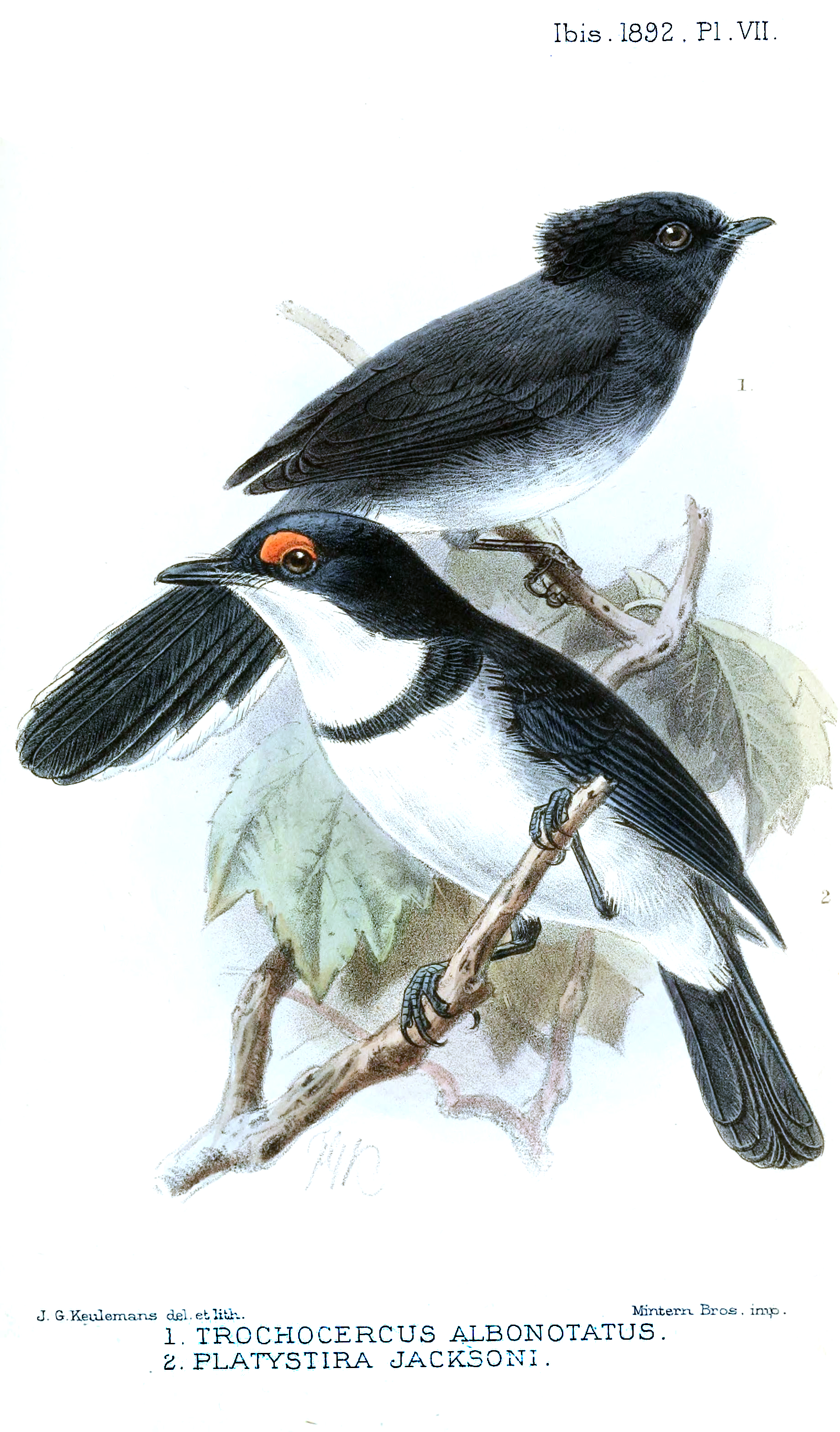 Trochocercus albonotatus (=Elminia albonotata ) & Platystira jacksoni (=Platysteira peltata jacksoni)